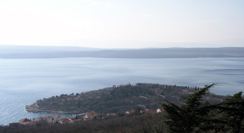 Kačjak, Dramalj, Hrvatska